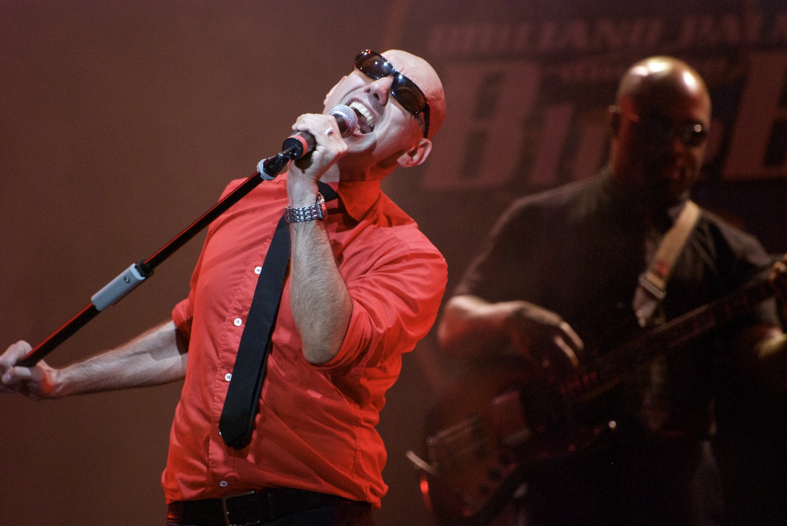 Giuliana Palma and the Blue Beaters all'Italia Wave Love Festival 2009 Livorno